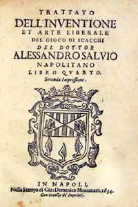 Kniha Aleesandra Salvia z roku 1604